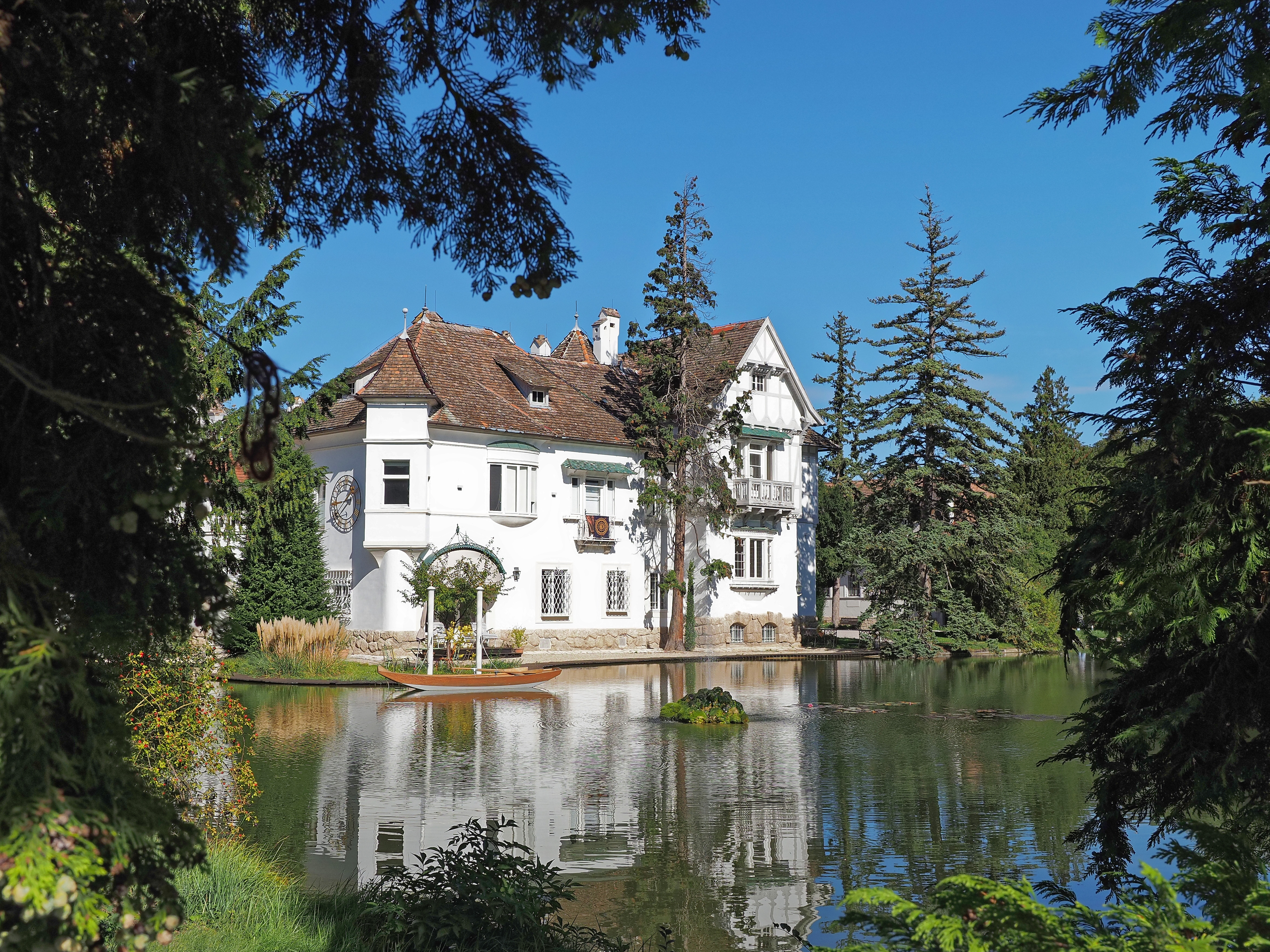 Schloss Schönau an der Triesting. Der Schlosspark steht unter Denkmalschutz.